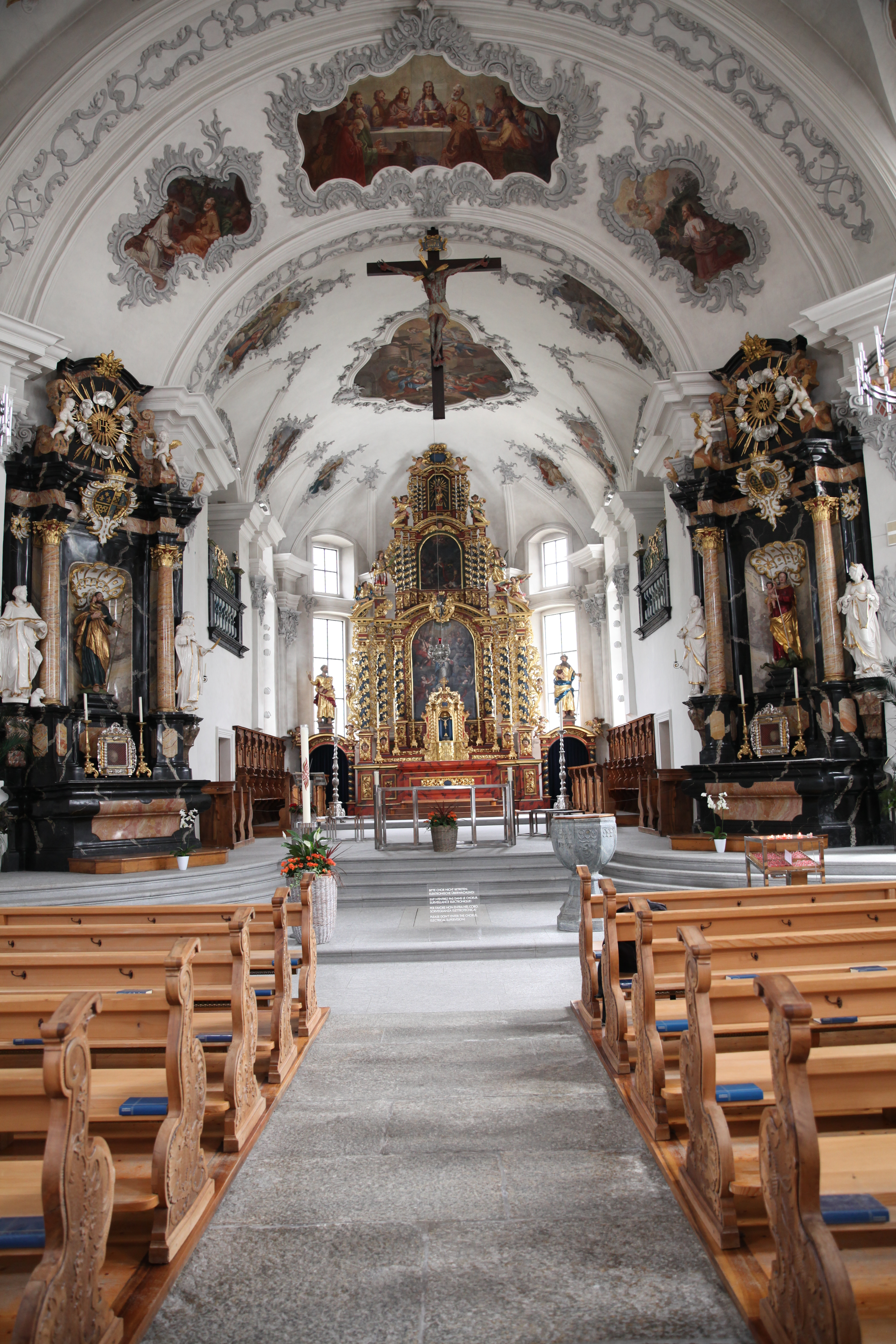 Andermatt, Katholische Pfarrkirche St. Peter und Paul, Altarraum